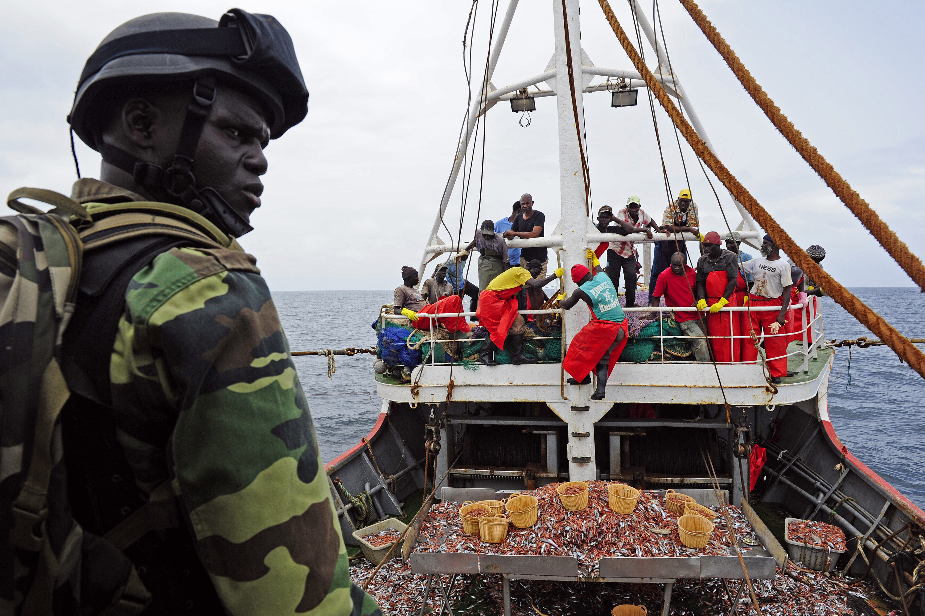 Marin sénégalais au cours de l'inspection d'un bateau de pêche.